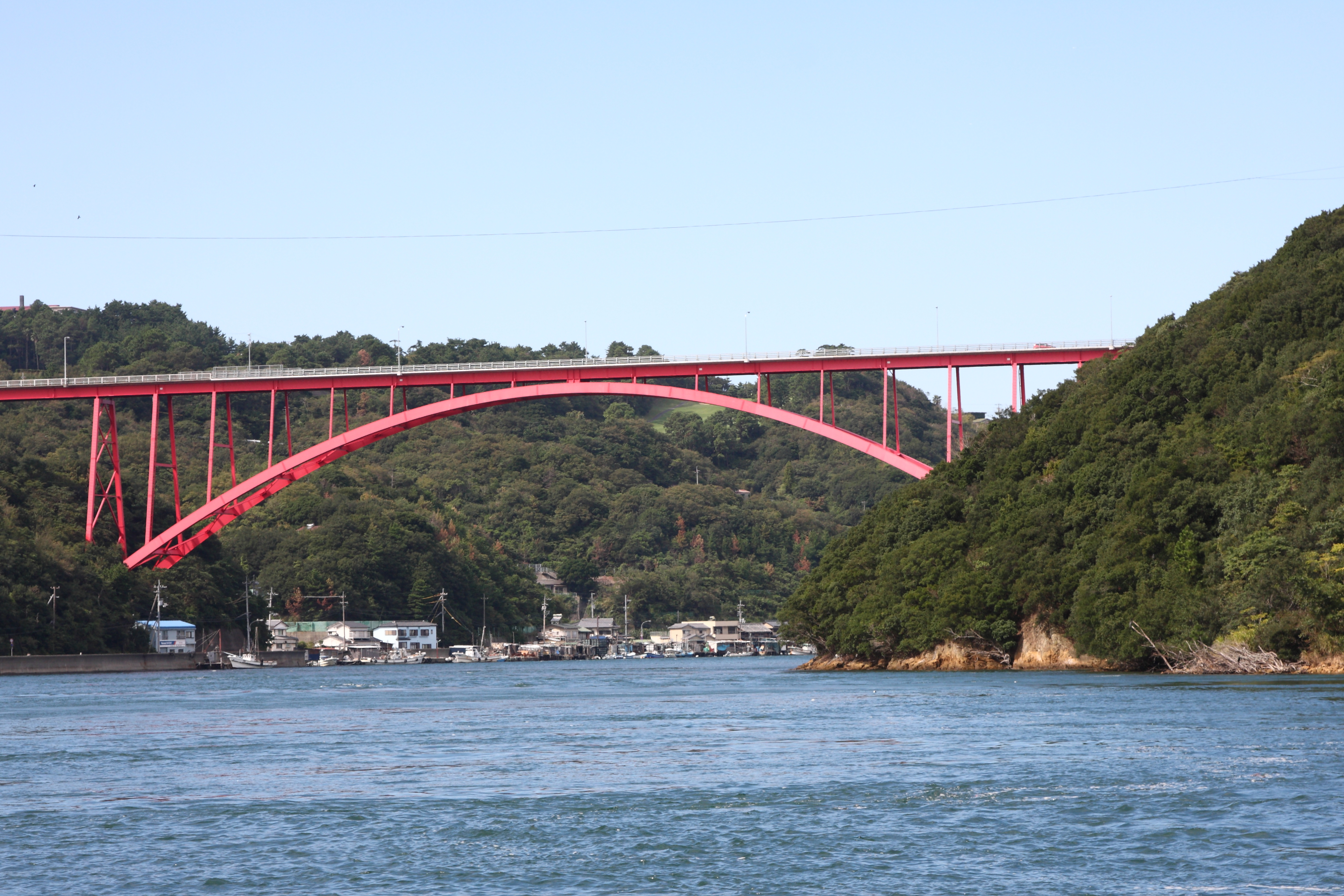 小鳴門新橋